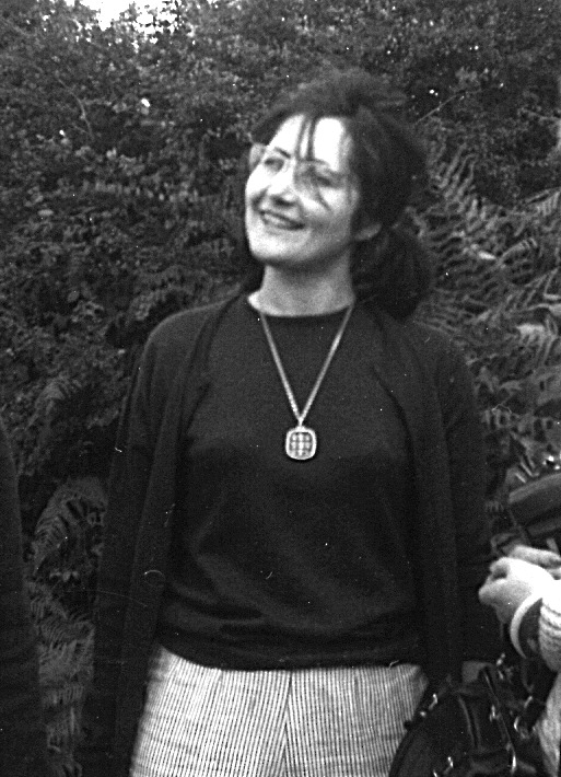 Garmenig Ihuelloù e Kamp ar Vrezhonegerien e Logivi-Plougraz e 1966.